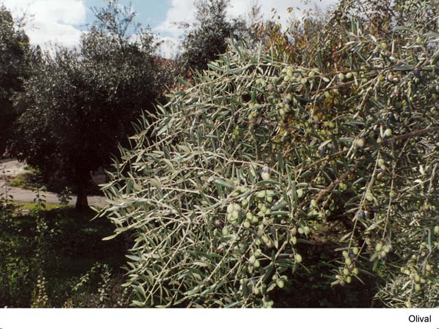 Olival na Freguesia do Alvito da Beira